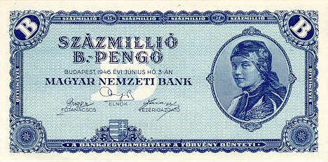 HUP 100.000.000 Bio. - reverse 1946